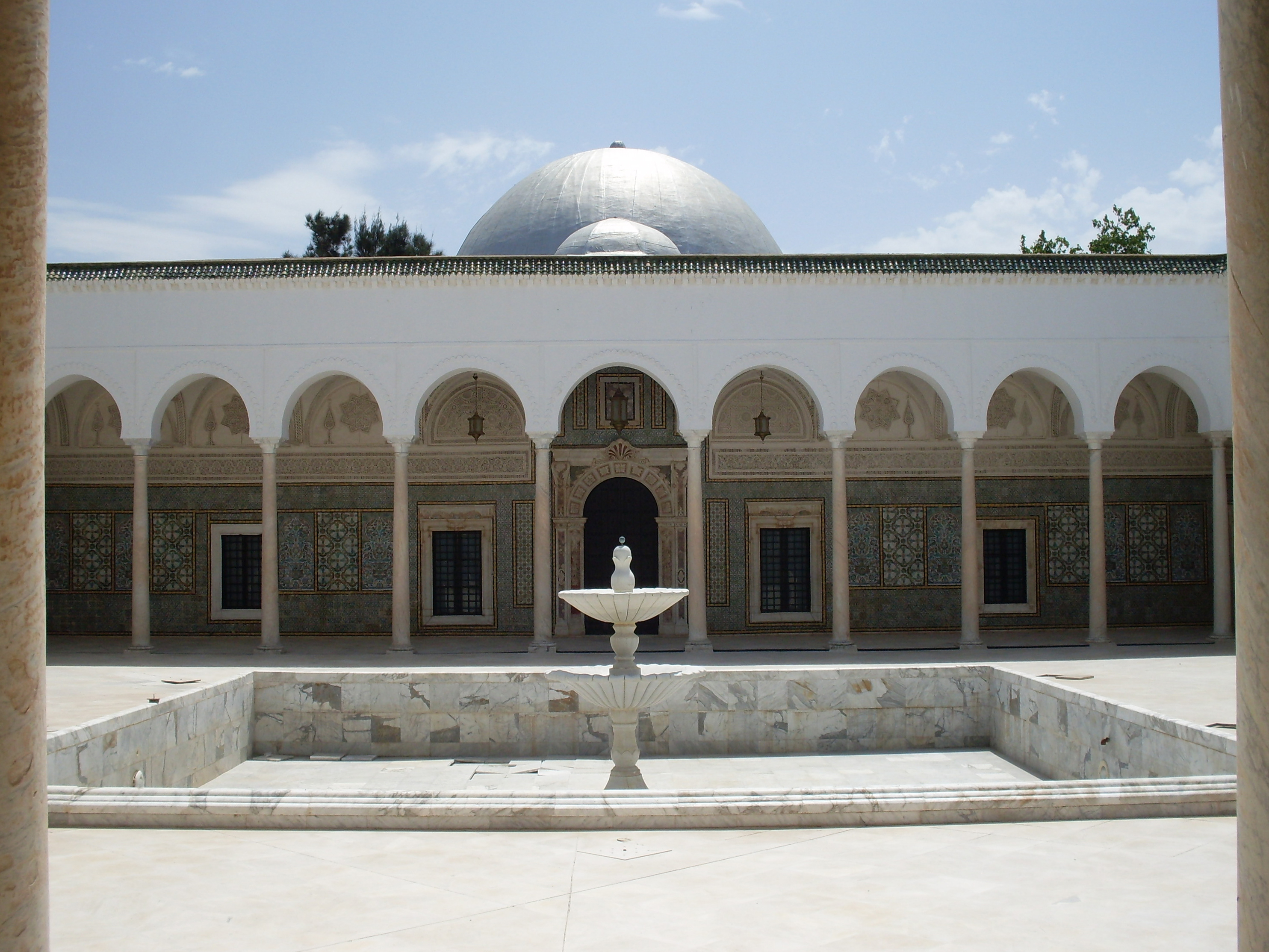 Salle d'honneur Palais de la rose Manouba Tunisie